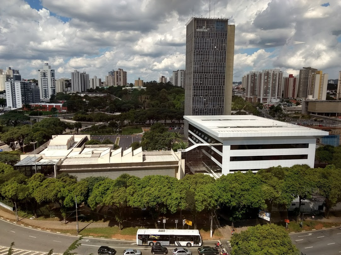 São Bernardo do Campo - Câmara dos Vereadores